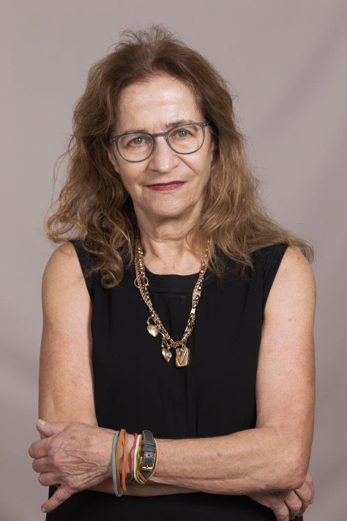 דיוקן של מיכל נאמן, 2019